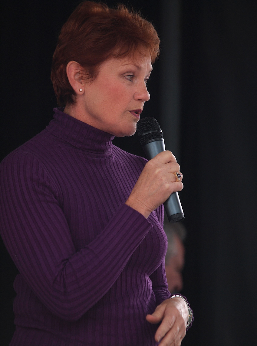 Kurri Kurri Nostalgia Festival - fashion parade judge, Pauline Hanson